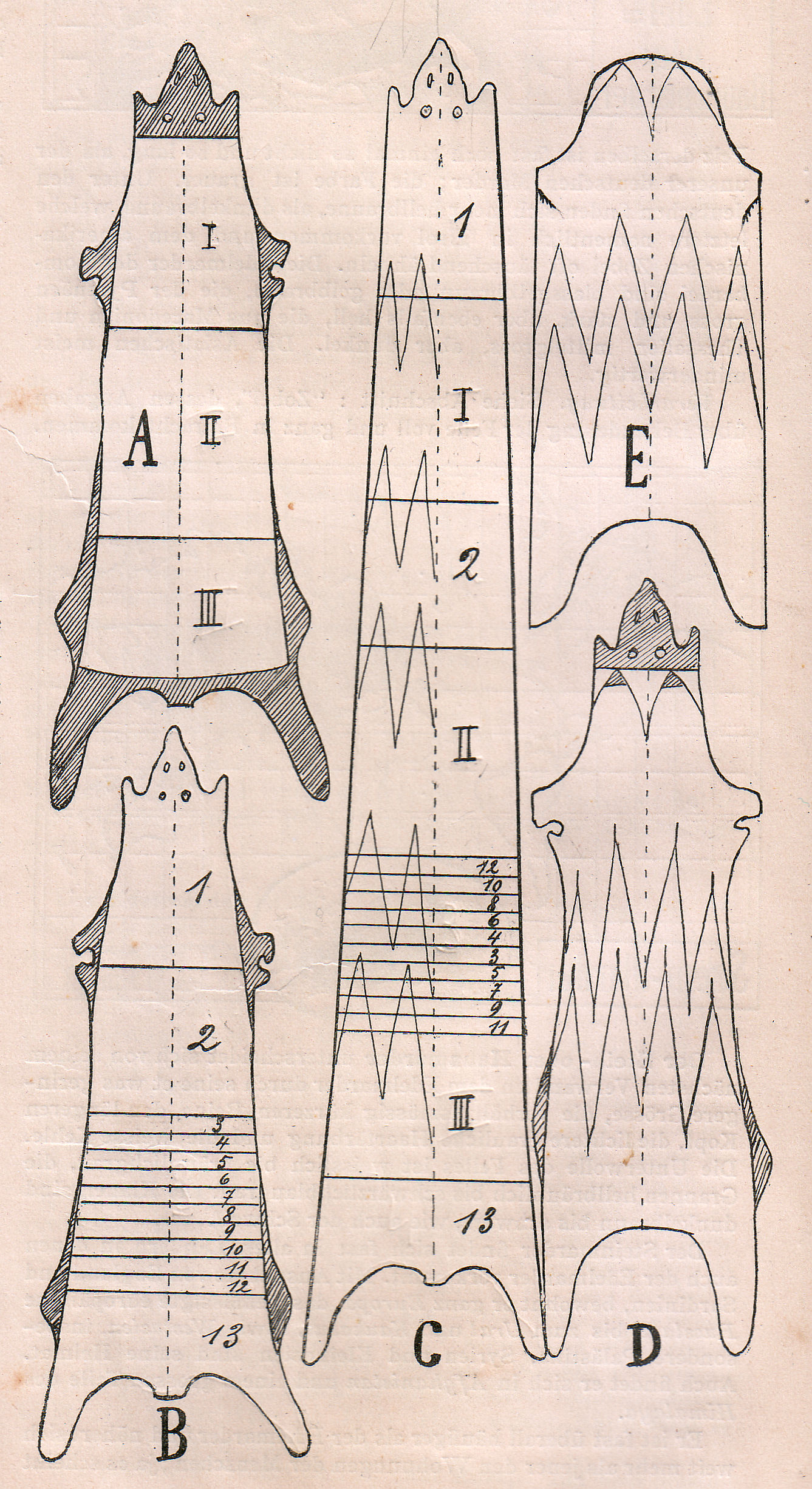 Kolinskyfell-Verarbeitung. Im Allgemeinen können die im Abschnitt: «Zobel» angegebenen Hilfsschnitte zur Anwendung kommen. Zur Erreichung einer unsichtbaren Quernath zwischen 2 Fellen ist es jedoch notwendig das schwächere Fell vollständig umzuwerfen, was beispw. bei runden Muffen eintreten kann. Wegen des oft schweren Leders wird aber vorgezogen die Felle zu Kragen oder Besätzen Pumpf gegen Pumpf, oder bei Etolen die Köpfe gegen einander zu stellen. Soll Pumpf auf Kopf zu stehen kommen, ist anzuraten die Klauen und den Schweif, zur Deckung der Verbindung stehen zu lassen. Zu schmalen Besätzen können die Felle auch quer geschnitten und wie “polnischer Besatz” gearbeitet werden. Das «Ineinanderversetzen» von zwei Fellen, das bei Etolen notwendig werden kann, ist nur mit Erfolg möglich, wenn die Felle in Rauche und Farbe gut zueinander passen. Fig. A, B, C zeigt im Princip wie diese heikle Arbeit ausgeführt werden kann. Fig. A und B zeigen zwei Felle bei denen der Krotzen genau angezeichnet ist, mit den gewöhnlich notwendigen Querschnitten. Fig. C die Art und Weise wie diese Schnitte untereinander versetzt werden. Ganz dunkle Felle, bedürfen weniger Schnitte, hellere gewöhnlich deren mehr. Es ist von Vorteil, wenn etwas markierende Schnitte, aus- oder eingelassen werden wie Fig C auf der linken Hälfte andeutet. Eine durchgelassene Quernath verliert sich leichter im Haar. Fig. D und E zeigen die Herstellung eines runden Muffes mit sichtbarer Quernath aus einem Fell. In diesem Fall ist angeraten den Kopf rund in den Hinterklauen einzulassen. Auf diese Weise kann der Muff grösser werden und die Verbindung von Pumpf auf Kopf leicht mit Schweifen verdeckt und garniert werden.